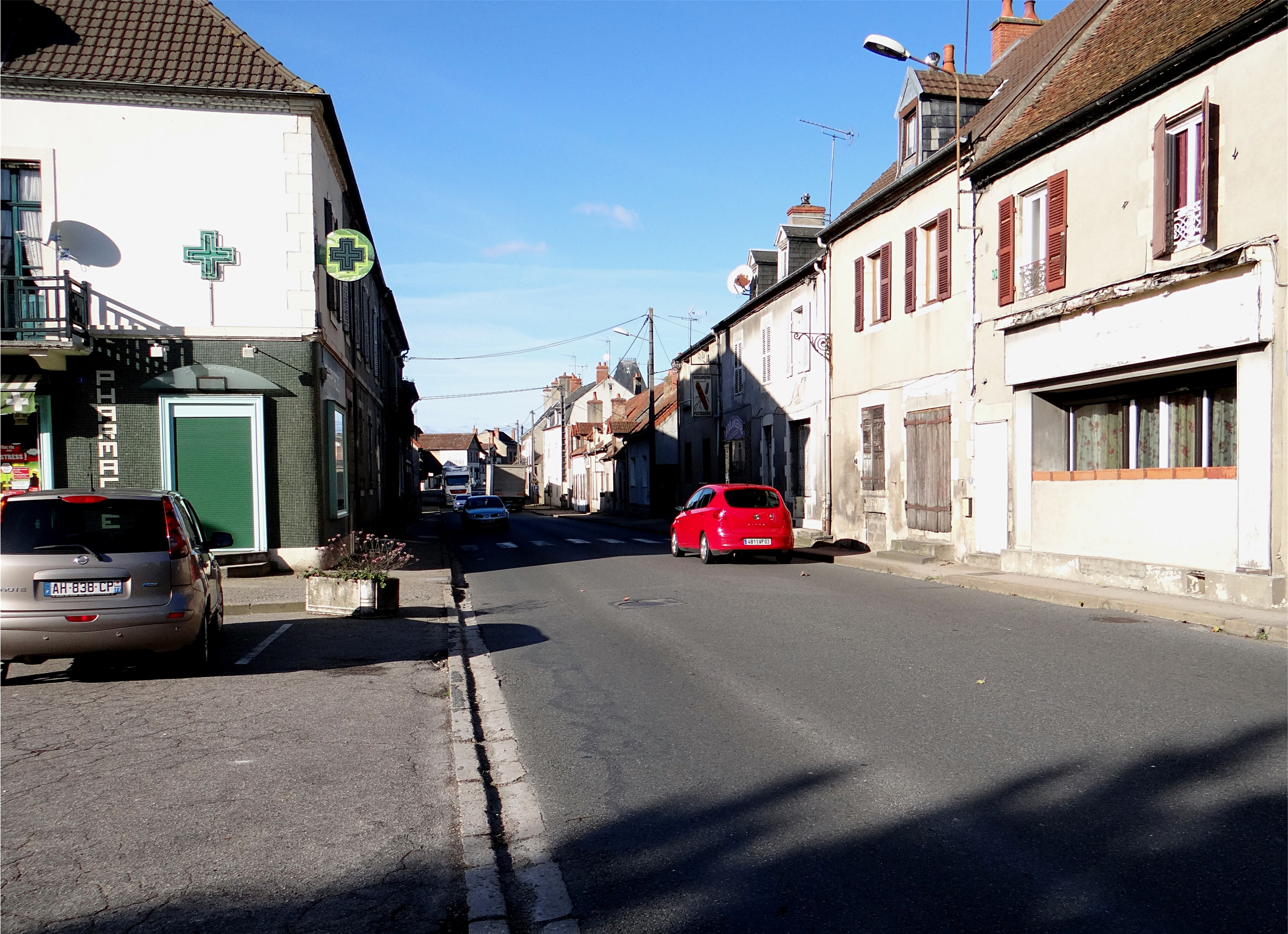 La route nationale 7 traversant le bourg, Villeneuve-sur-Allier, Allier, France.